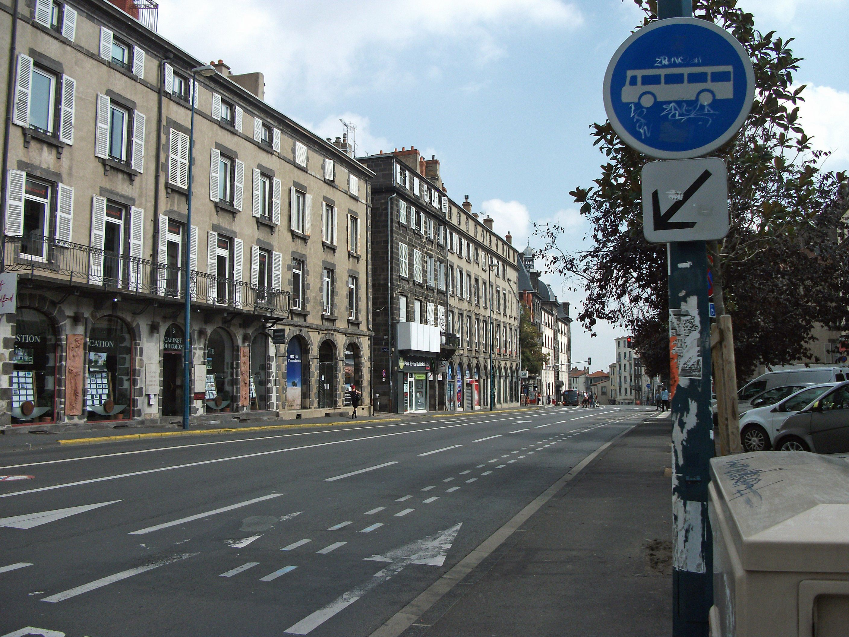 Place Hippolyte Renoux et couloir bus signalé par des panneaux (datés de 1992) ; peu avant l'arrêt de bus Ballainvilliers des lignes B, C, 9 et 10.